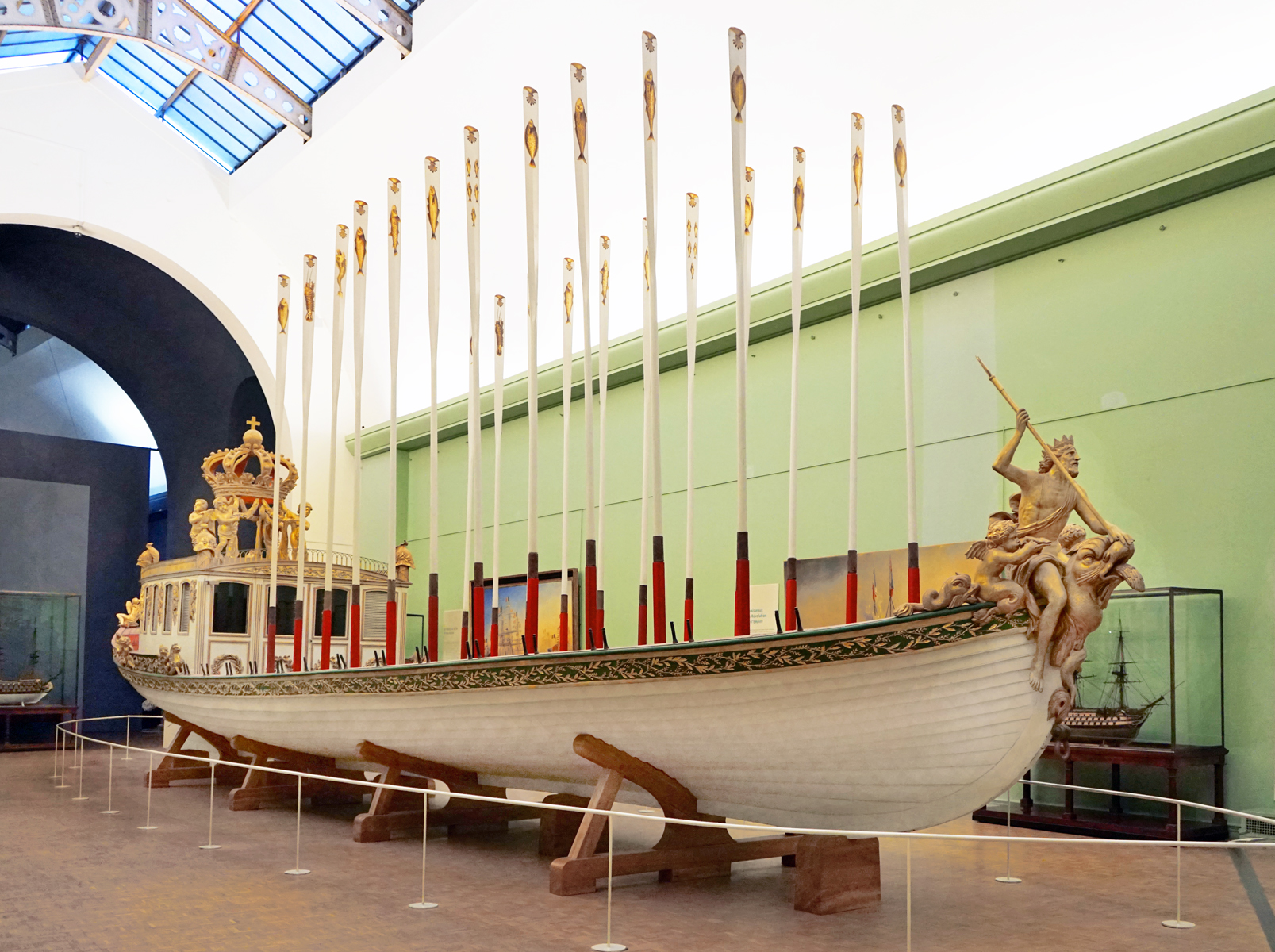 La salle du canot de l'Empereur Napoléon Ier construit en 1810 L'embarcation a rejoint le musée en 1945. Le Canot impérial de Napoléon Ier est la seule embarcation de ce type que la France a su conserver dans son intégrité. Sa construction a été décidée dans le plus grand secret au printemps 1810, lorsque l'Empereur proposa de se rendre à Anvers pour visiter l’arsenal, dont il avait ordonné la création quelques années plus tôt. L’ingénieur Guillemard fournit les plans du canot, tandis que le maître Théau, originaire de Granville, en supervise la construction. Les éléments décoratifs sont confiées au sculpteur anversois Van Petersen. En 21 jours seulement l’embarcation est prête. Elle mesure plus de 18 mètres de long... Extrait du site officiel du Musée national de la Marine